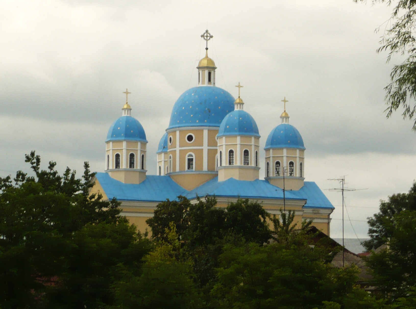 Cerkiew pw. św. Włodzimierza